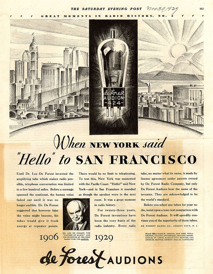 Gовідомлення про винахід Лі де Фореста